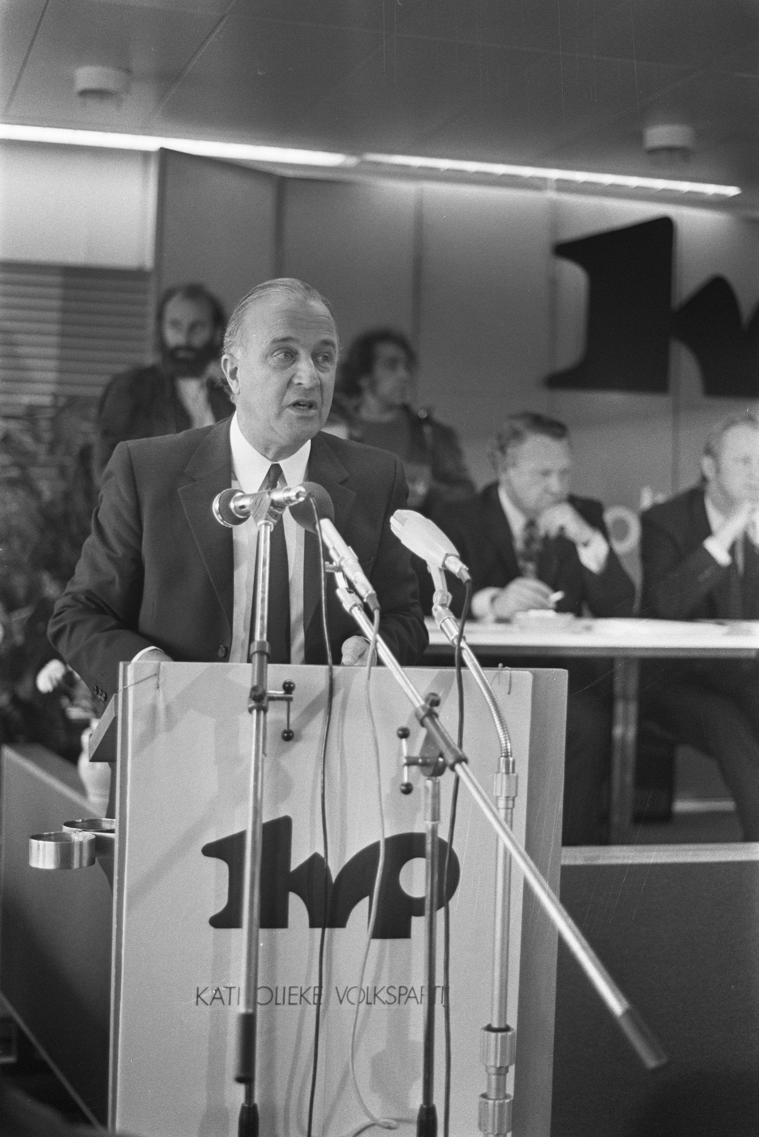 Collectie / Archief : Fotocollectie Anefo Reportage / Serie : [ onbekend ] Beschrijving : Voorzitter De Zeeuw op de vergadering van de partijraad van de KVP te Tilburg Datum : 30 september 1972 Locatie : Noord-Brabant, Tilburg Trefwoorden : conferenties, politieke partijen, vergaderingen, voorzitters Persoonsnaam : Zeeuw, Dick de Instellingsnaam : KVP Fotograaf : Peters, Hans / Anefo Auteursrechthebbende : Nationaal Archief Materiaalsoort : Negatief (zwart/wit) Nummer archiefinventaris : bekijk toegang 2.24.01.05 Bestanddeelnummer : 925-9221